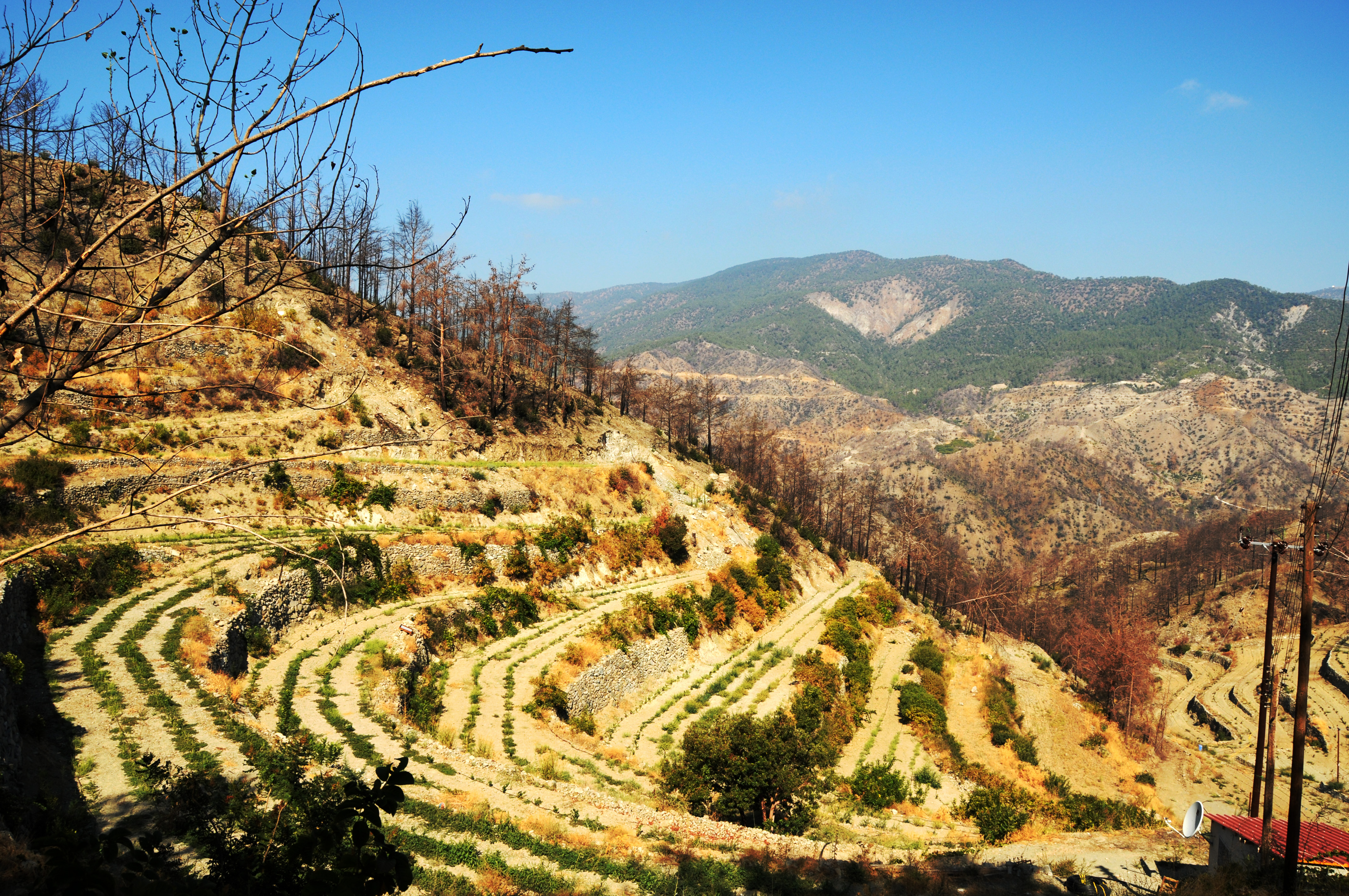 Vignoble de Palendria suivant les courbes de niveau